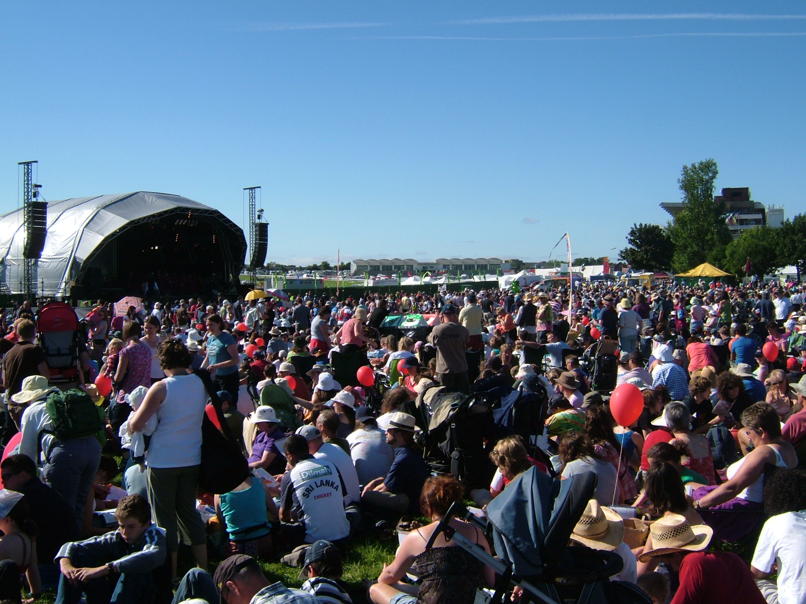 Mainstage at Greenbelt 2007